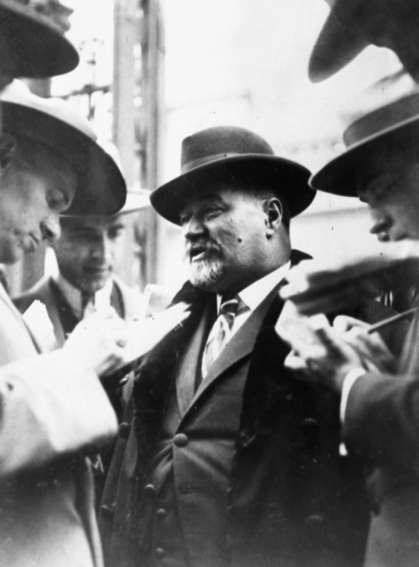 Die Schüsse in der Skupschtina Die Bluttag im Belgrader Parlament, löste in ganz Kroatien eine grosse Erregung aus. Es kam dabei insbesondere in Agram zu blutigen Zusammenstössen zwischen demonstrierenden Studenten und der Polizei. Nach den neuesten Meldungen aus Jugoslawien muss stündlich mit dem Tod des kroatischen Führers Stephan Raditsch gerechnet werden. Die Folgen, die der Tod des Führers der kroatischen Opposition für das ganze Land haben würde, sind unübersehbar. Der Ernst der Lage kennzeichnet sich in der plötzlichen Rückkehr König Alexanders von seinem Sommersitz nach Belgrad. U.B.z.: Stephan Raditsch 3863/28 Information added by Wikimedia users.